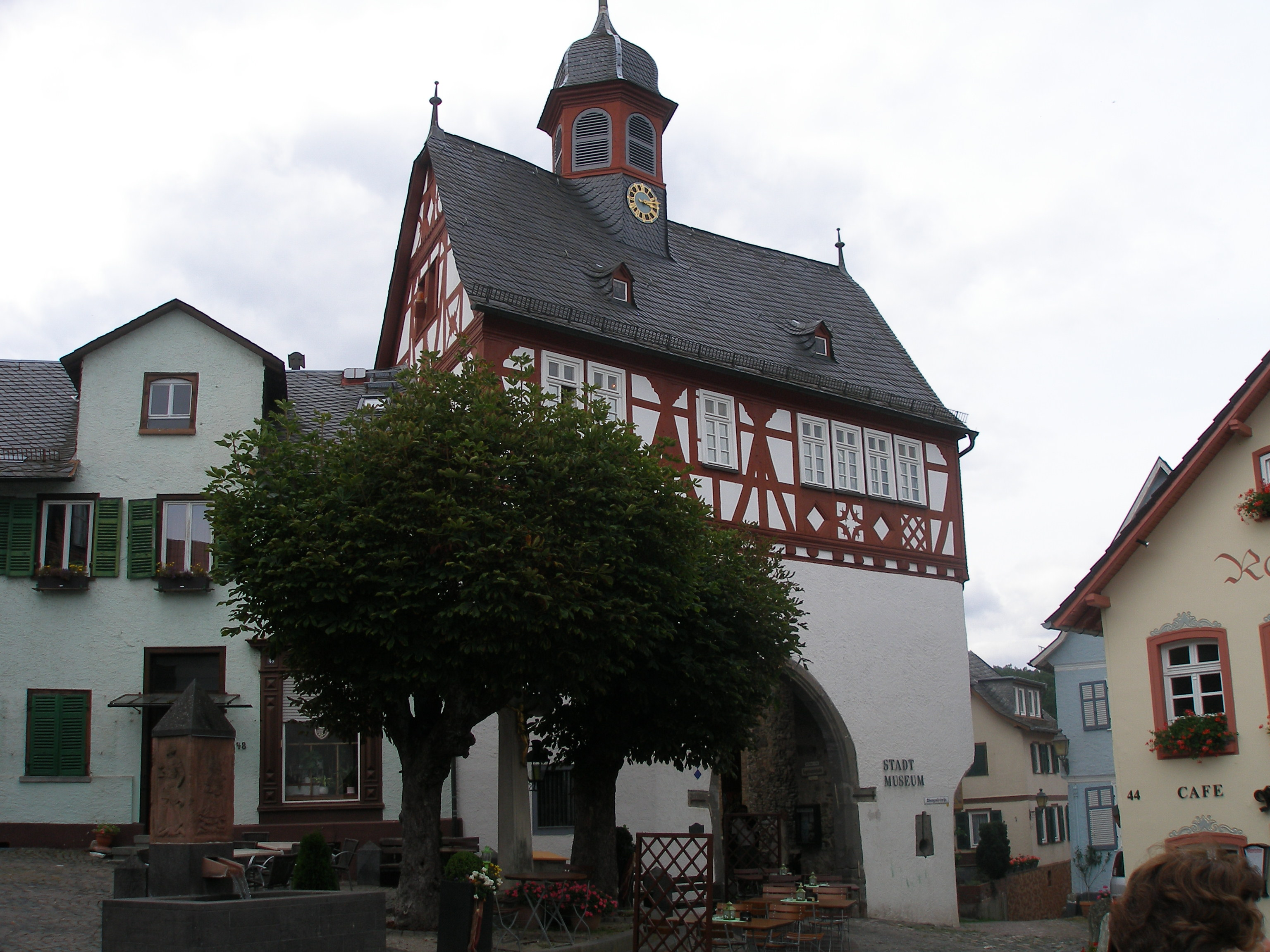 Königstein im Taunus